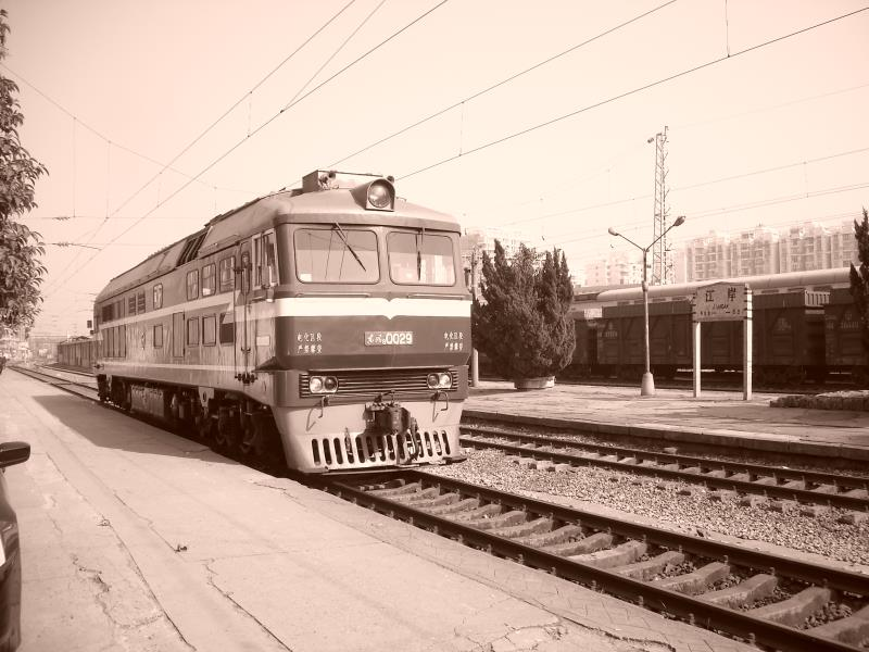 中文（中国大陆）: 江岸站旧址